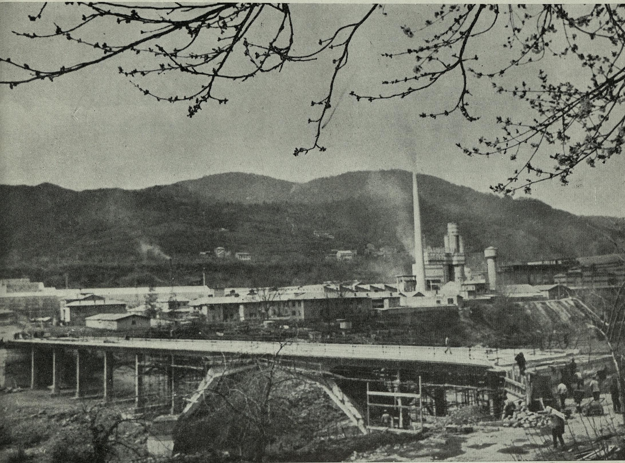 Pogled na Tovarno cementa in salonita Anhovo z mostom v gradnji; Gradbeni vestnik - 10 - 1966.